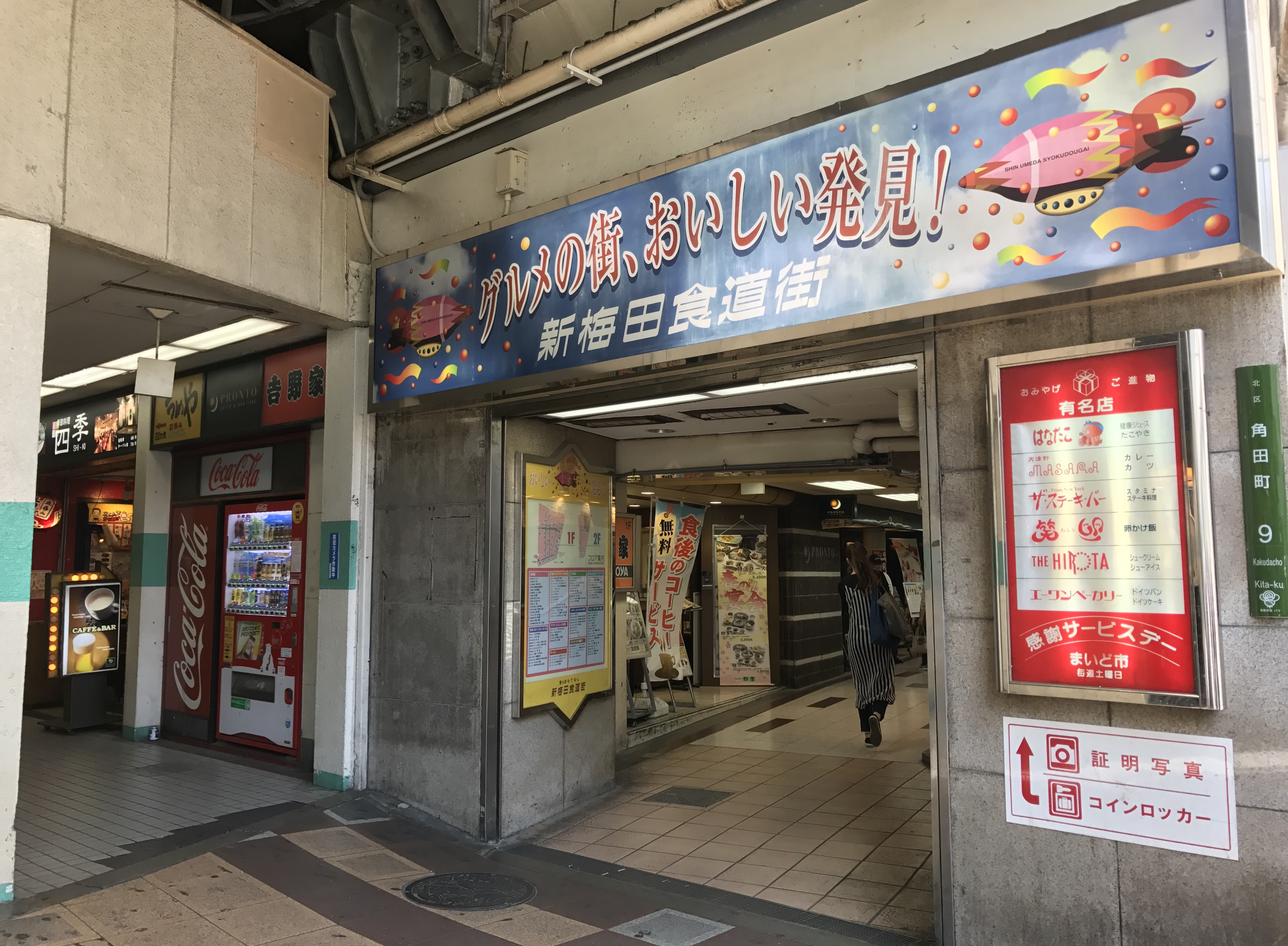 大阪市北区の新梅田食道街入口。